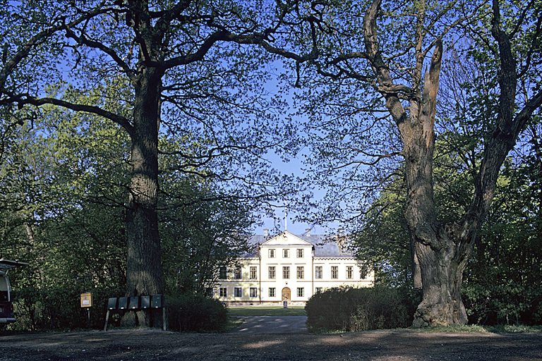 Herrgårdsentrén. Bilden troligen från mitten av 1970-talet. Motiv: Åkerby herrgård Kategori: HerrgårdHerrgårdsentrén. Bilden troligen från mitten av 1970-talet.